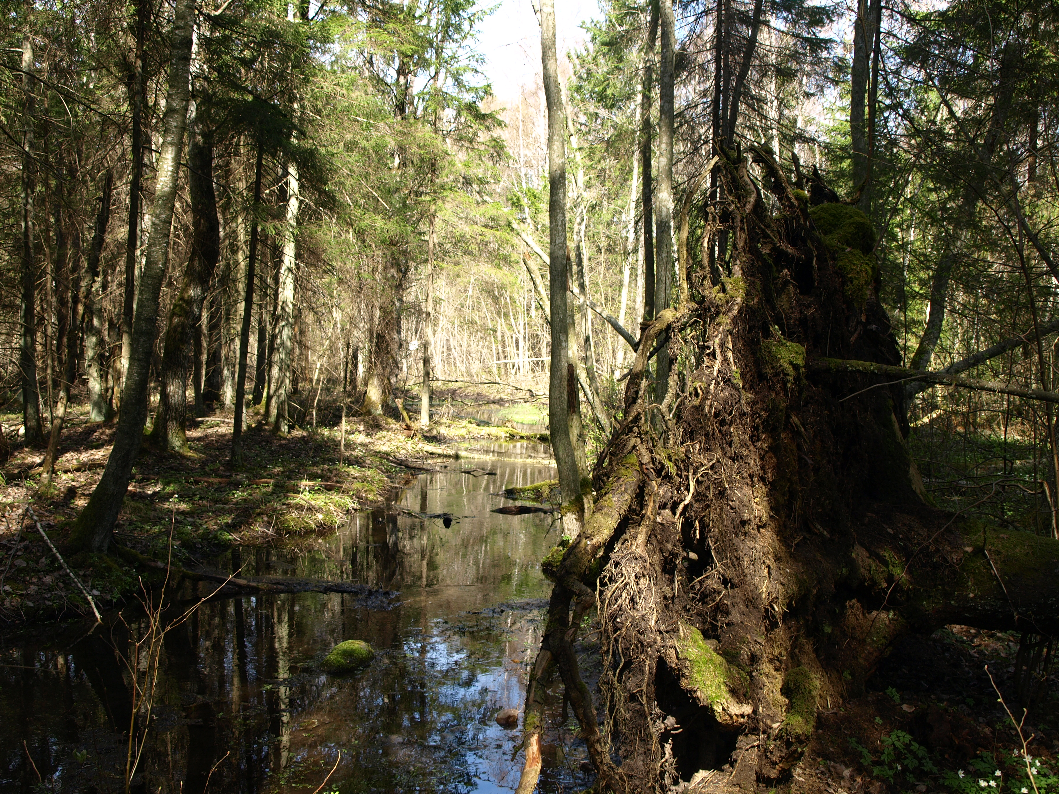 Ohvriallikas "Uduallikas"